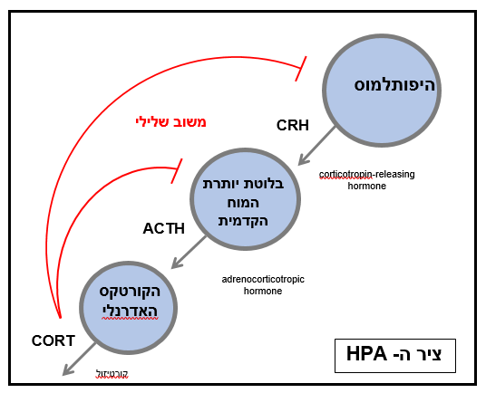 איור 1: פעילות ציר ההיפותלמוס – בלוטת יותרת המוח- בלוטת יותרת הכליה